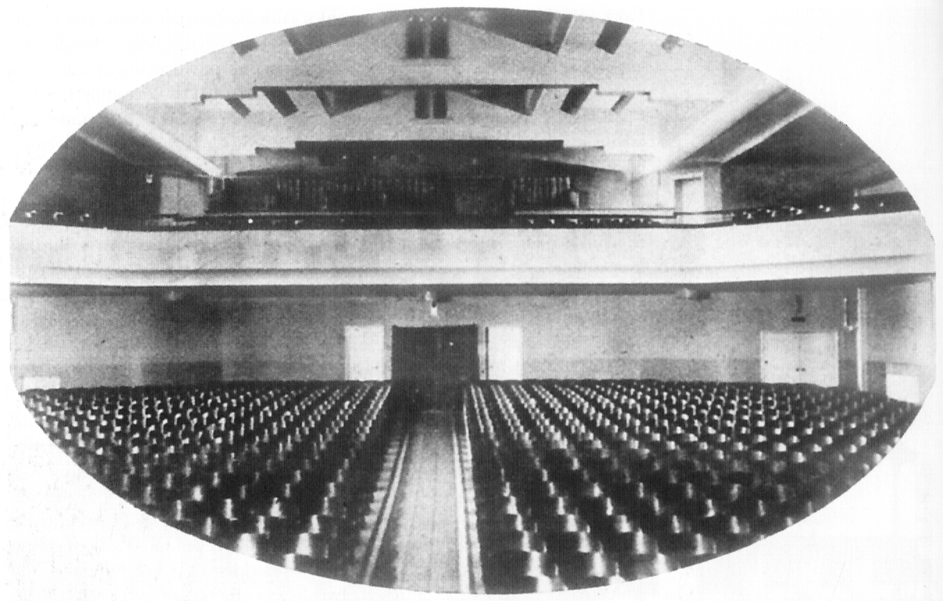 Unionkino Erfurt innen